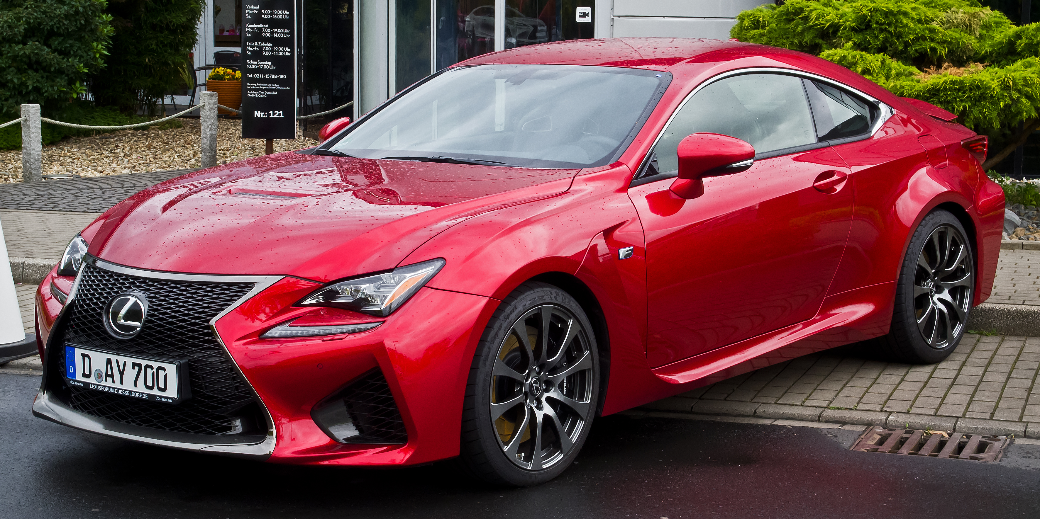 Lexus RC F